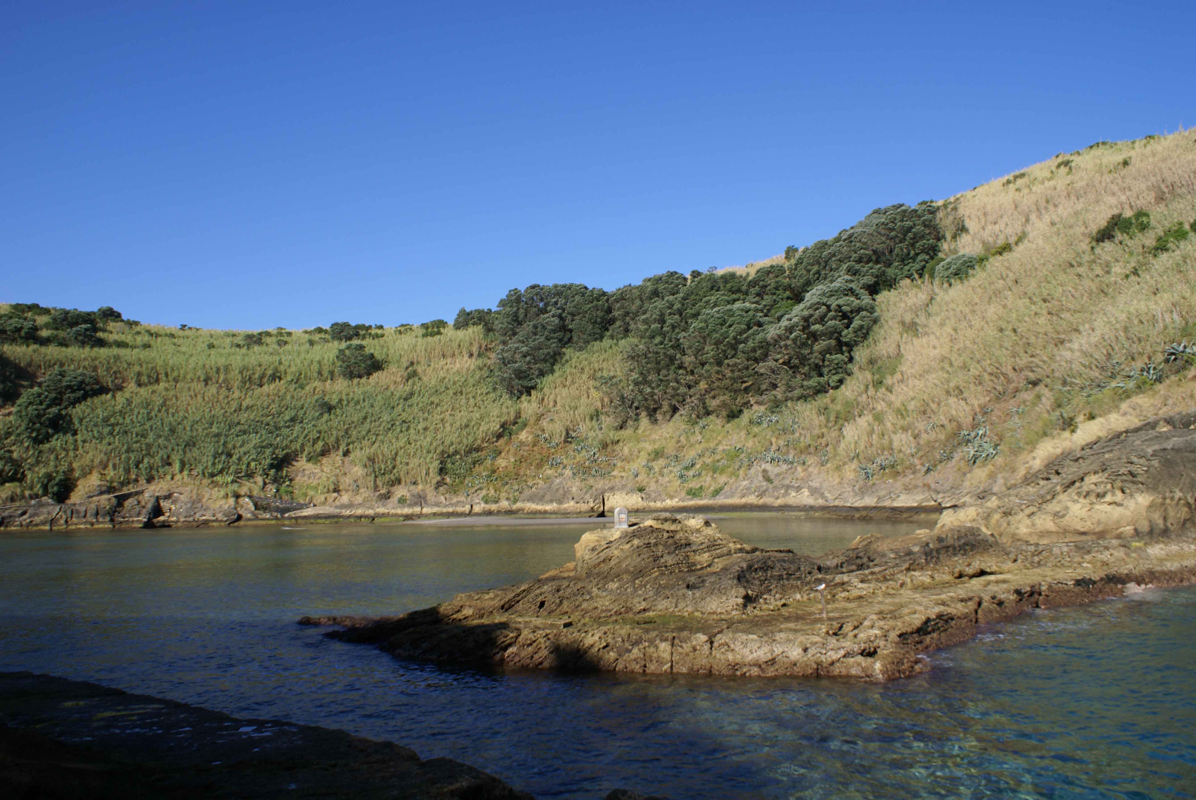 Ilhéu de vila Franca do Campo, lagoa interior, Vila Franca do Campo, ilha de São Miguel, Açores